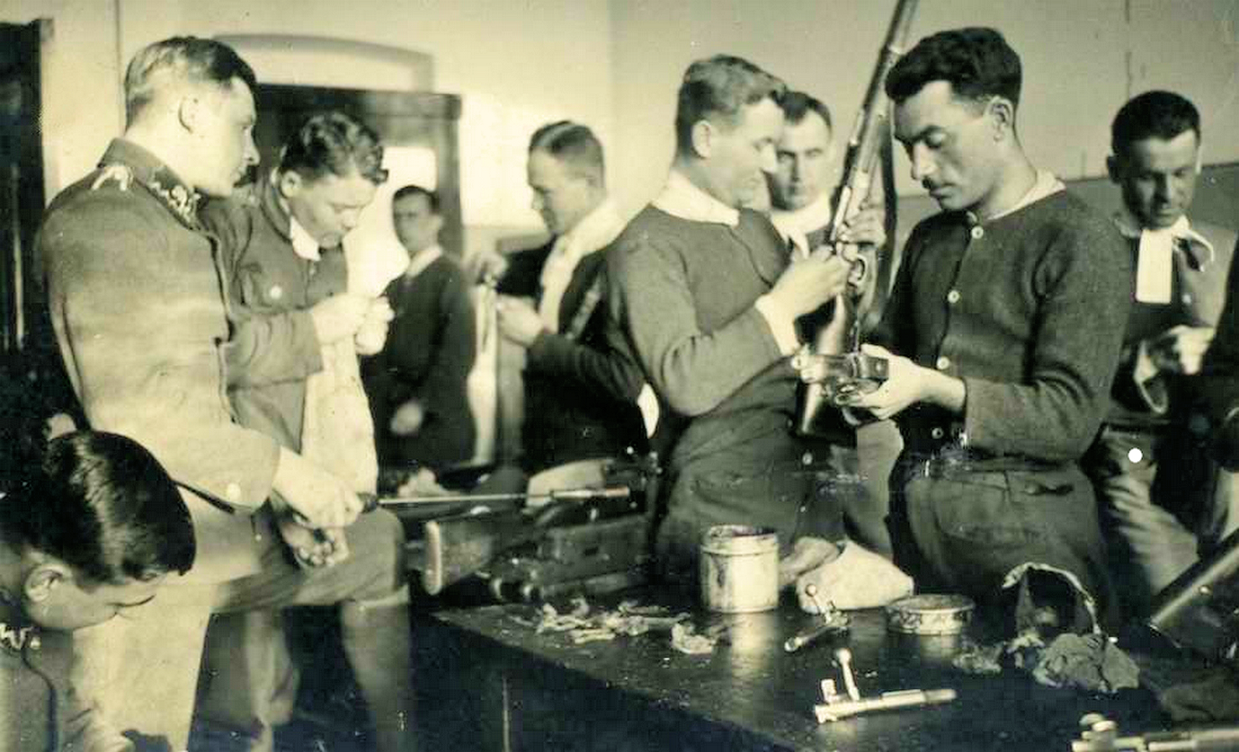 Podchorążowie z rocznika promowanego w 1933 - Szkoła Podchorążych Piechoty Komorów - Ostrów Mazowiecka